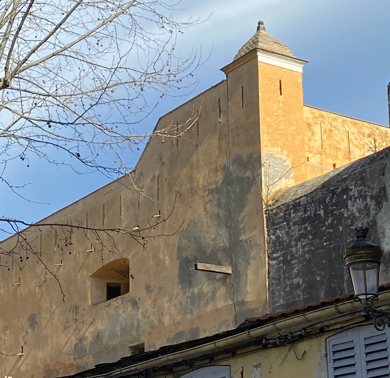 A forca (la potence) nant'à una facciata di a Citatella di Bastia